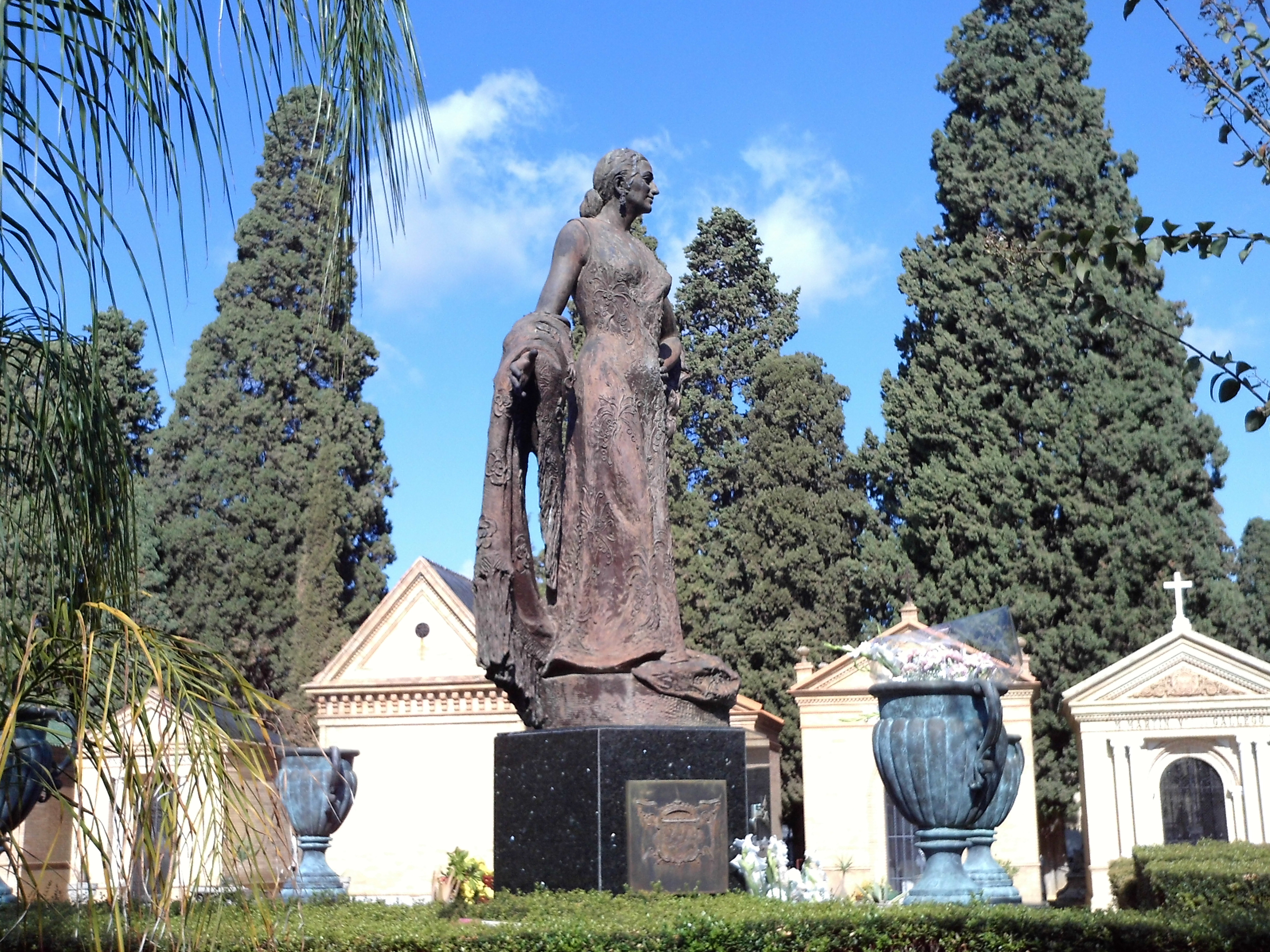 Tumba de Juanita Reina. Luis Sanguino. 2000. Cementerio de San Fernando. Sevilla, Andalucía, España.